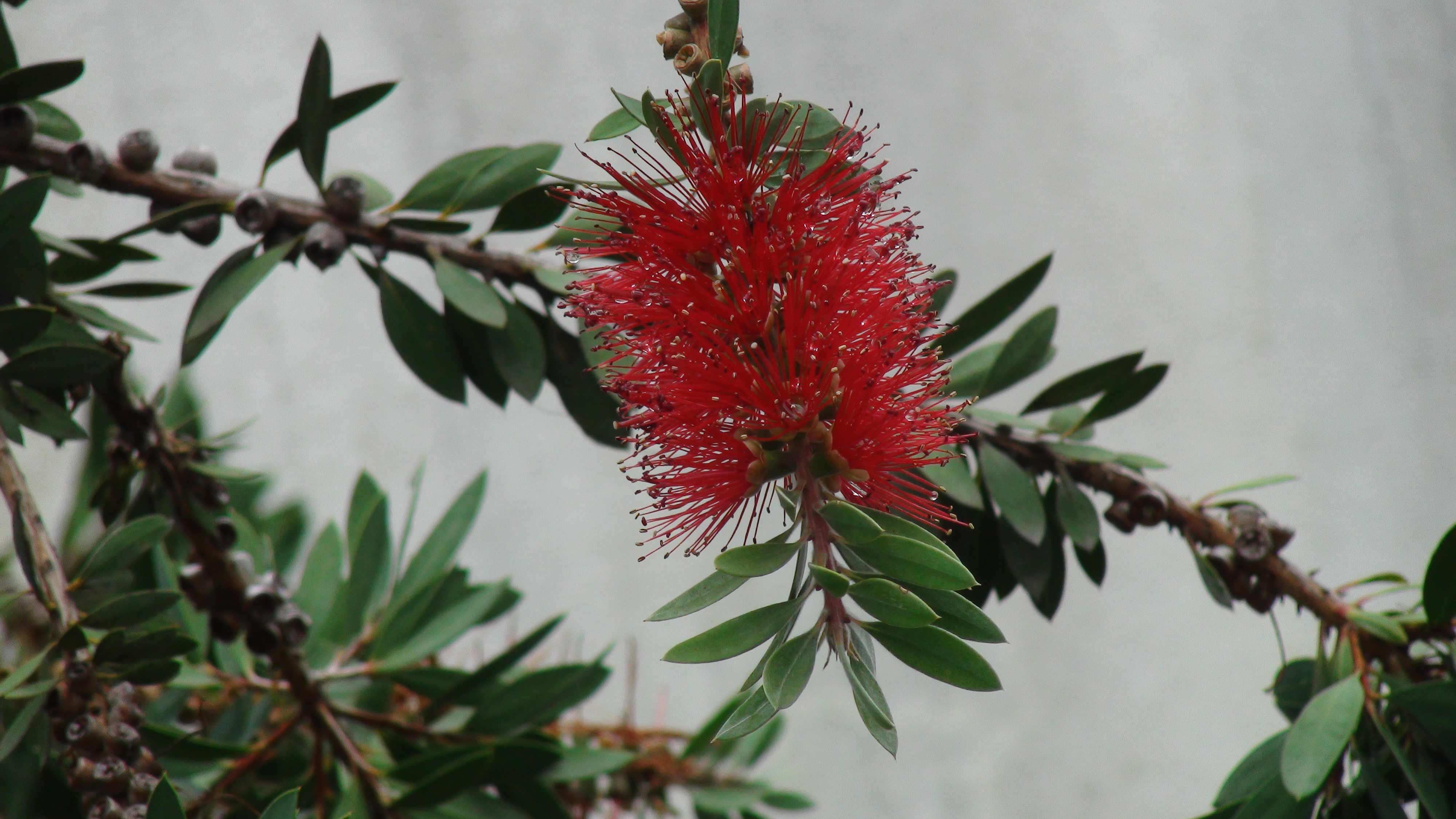 Uma flor vermelha, espinhosa.